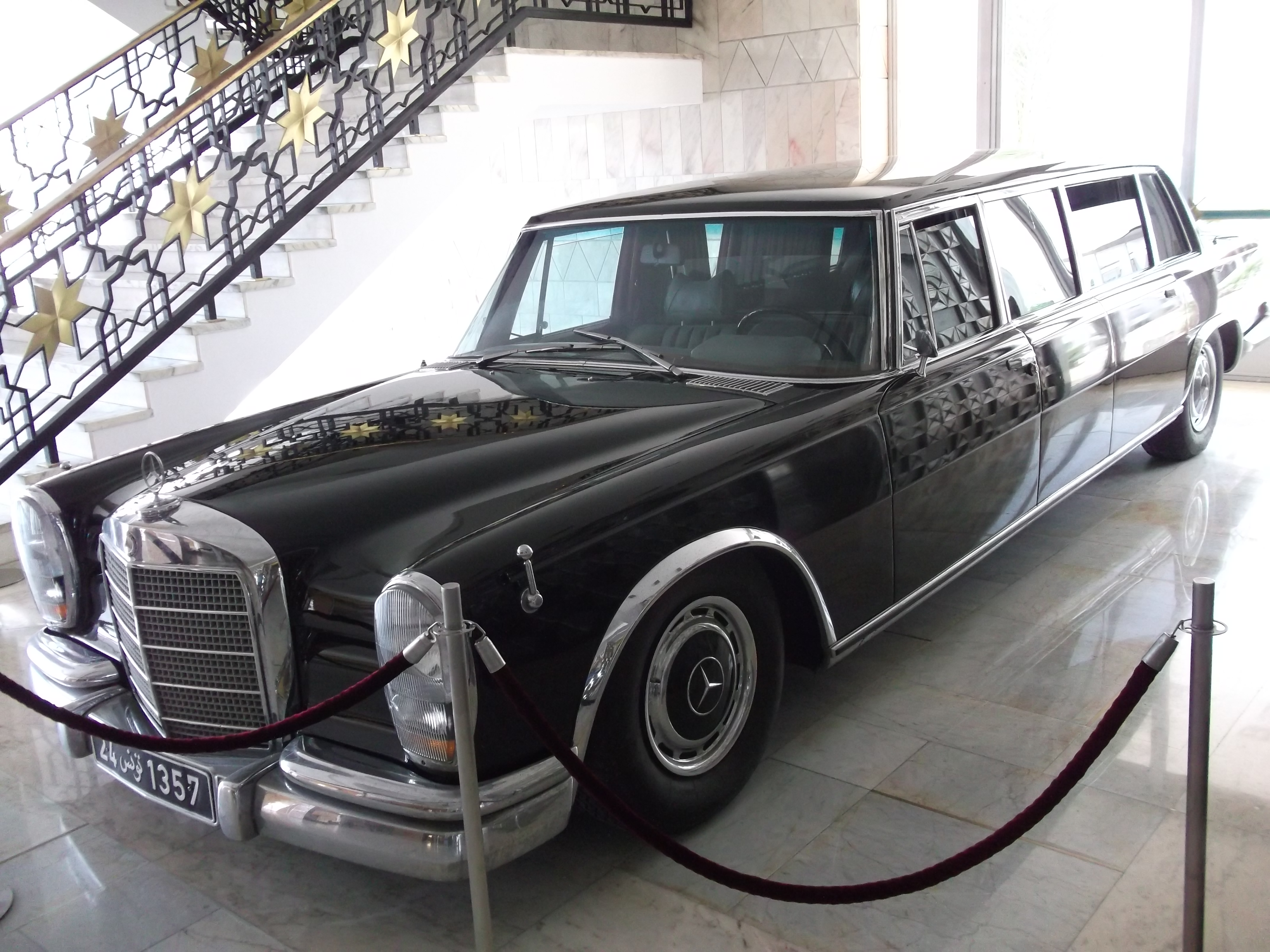 Palais dit « Kasr Skanes », Monastir